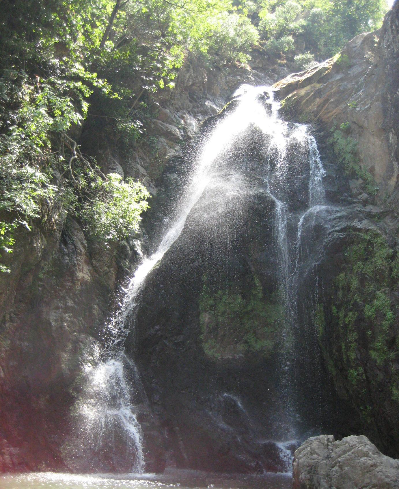 Su Düşen Waterfall,Yalova,Turkey